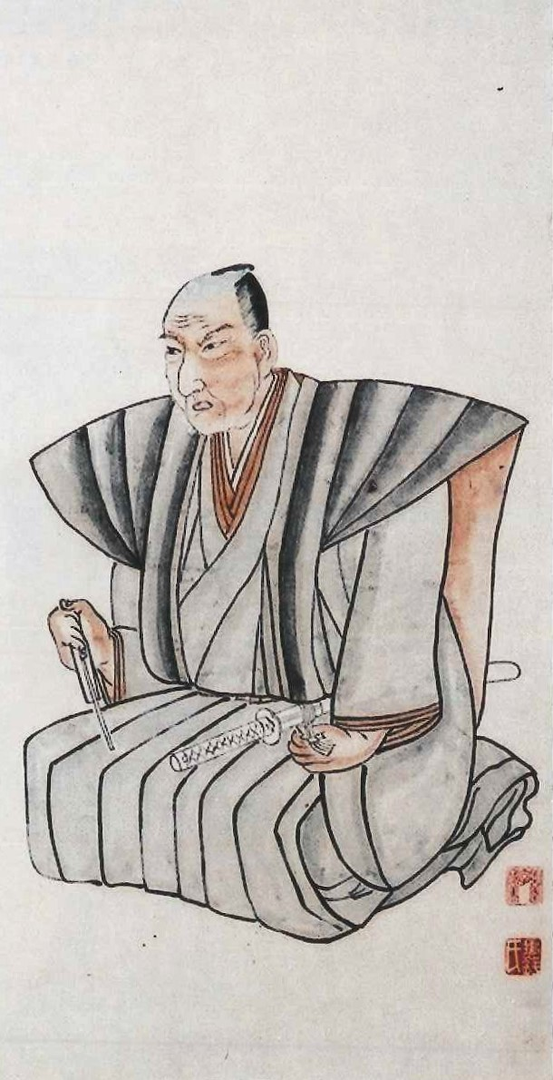 田中葵園肖像 牛窪弘善画 佐渡市佐渡学センター田中葵園資料C813